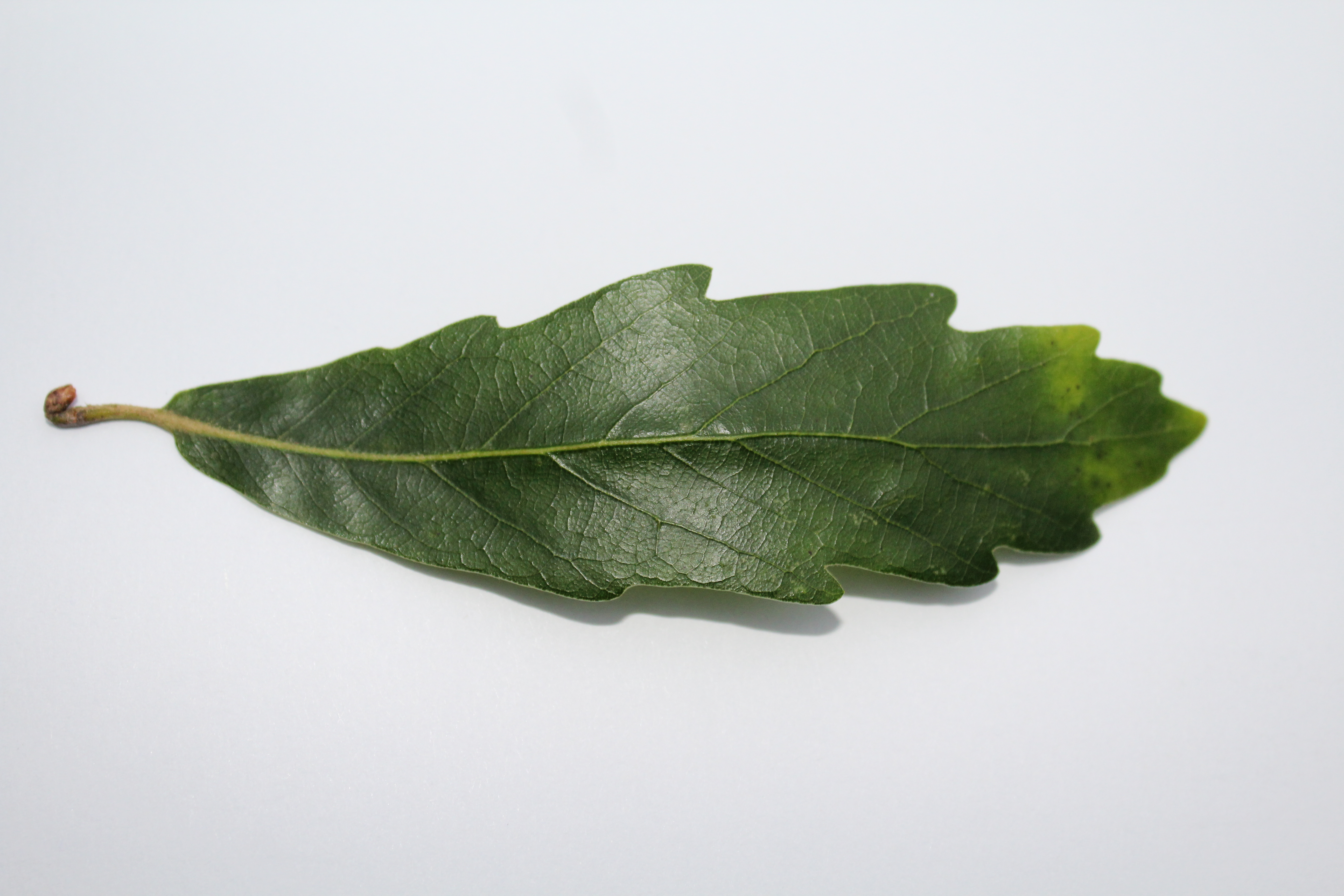 Oberflächenstruktur der Oberseite des Blattes der Immergrünen Eiche